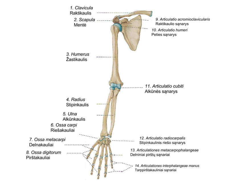 Rankos kaulai ir jungtys